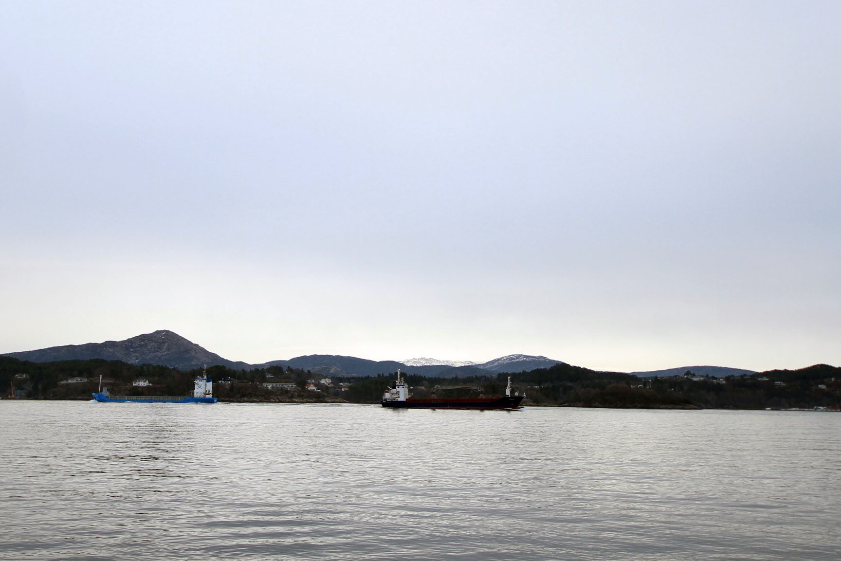 Hjeltefjorden